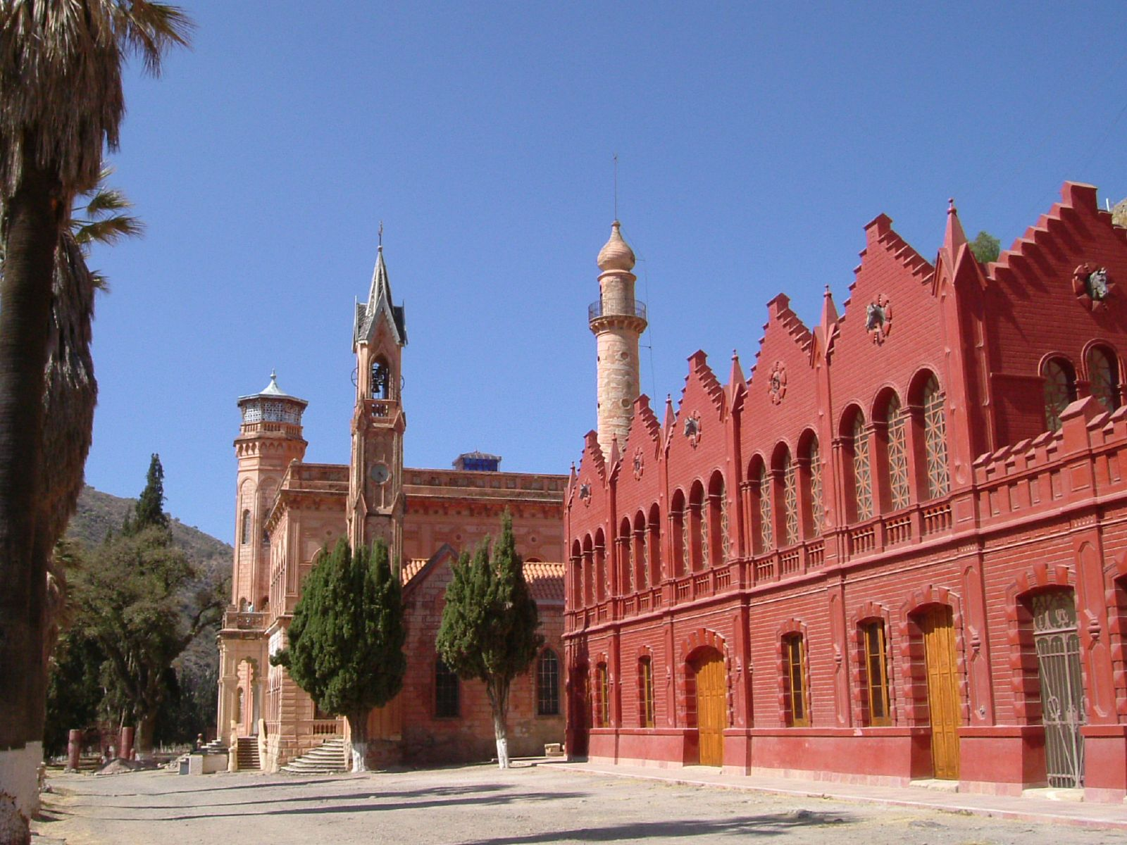 Castillo del Principado. El Castillo del Principado de La Glorieta. Runa Simi: Castillo del Principado de La Glorieta, Chuqichaka.